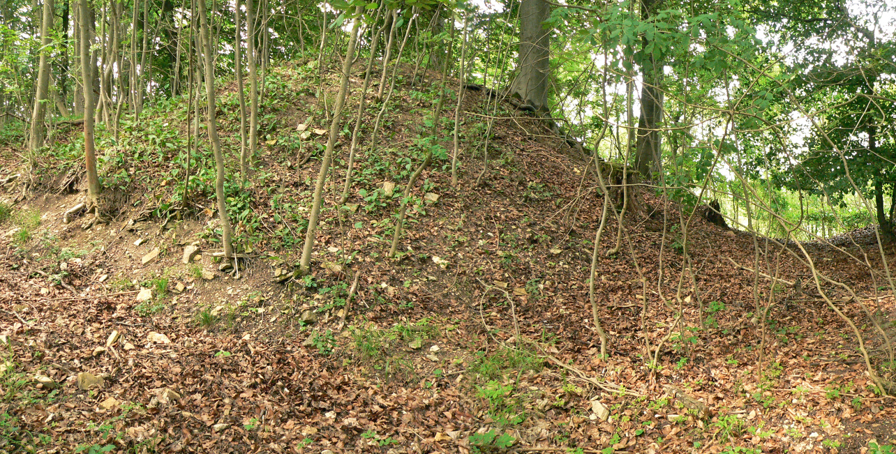 Von Waldweg durchschnittener Vorwall der Alten Burg (Bühle)